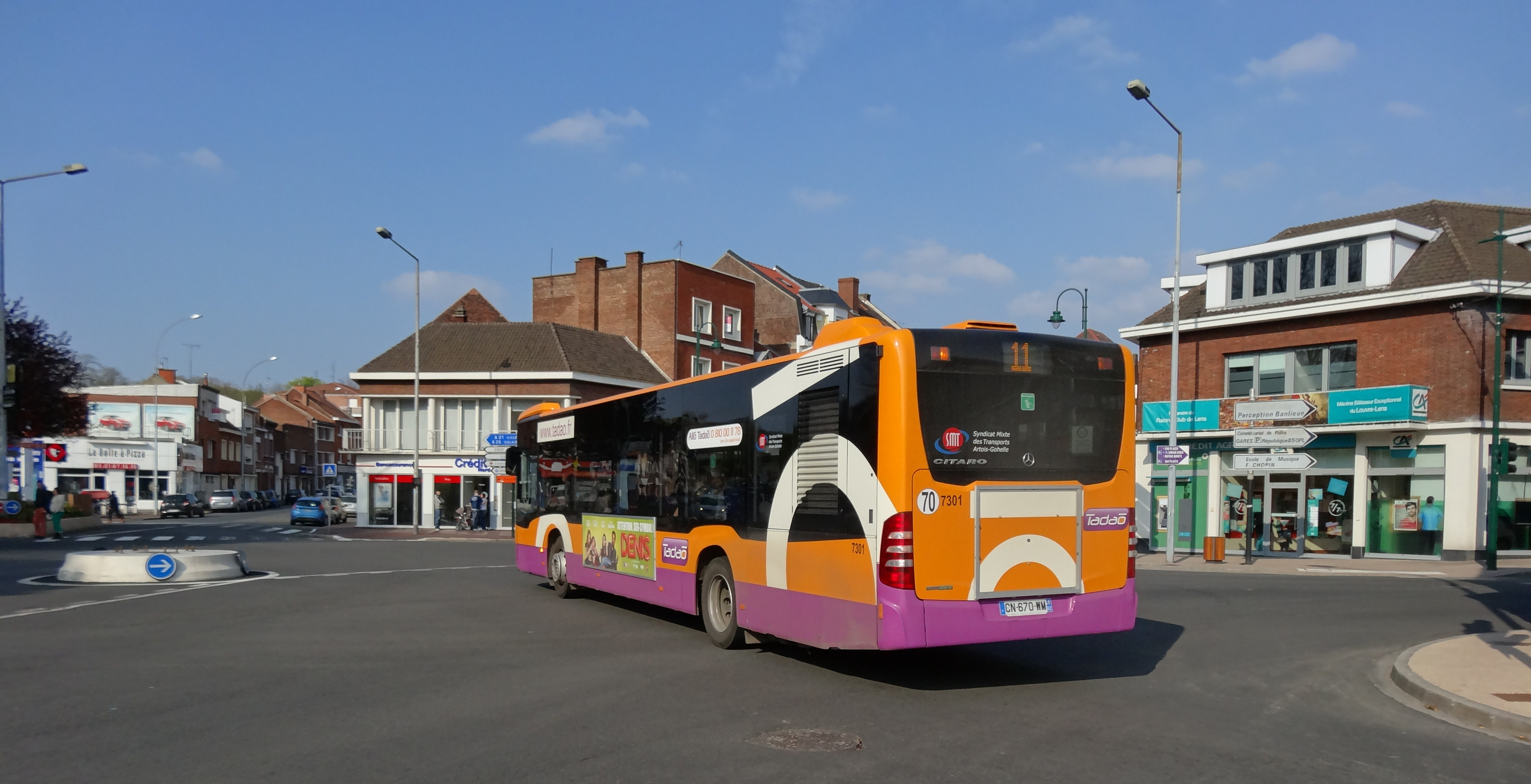 Bus Tadao à Lens, Pas-de-Calais, Nord-Pas-de-Calais, France.